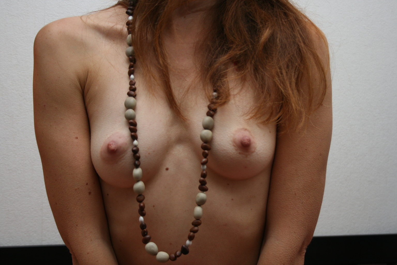 Poitrine d'une femme avant la gestation.